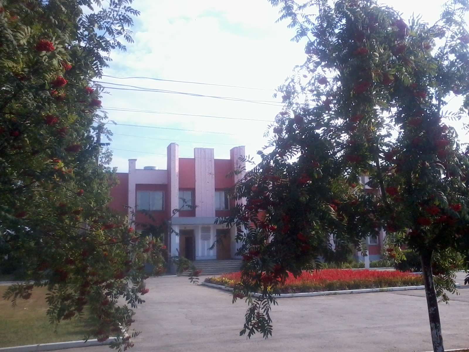 Дом культуры